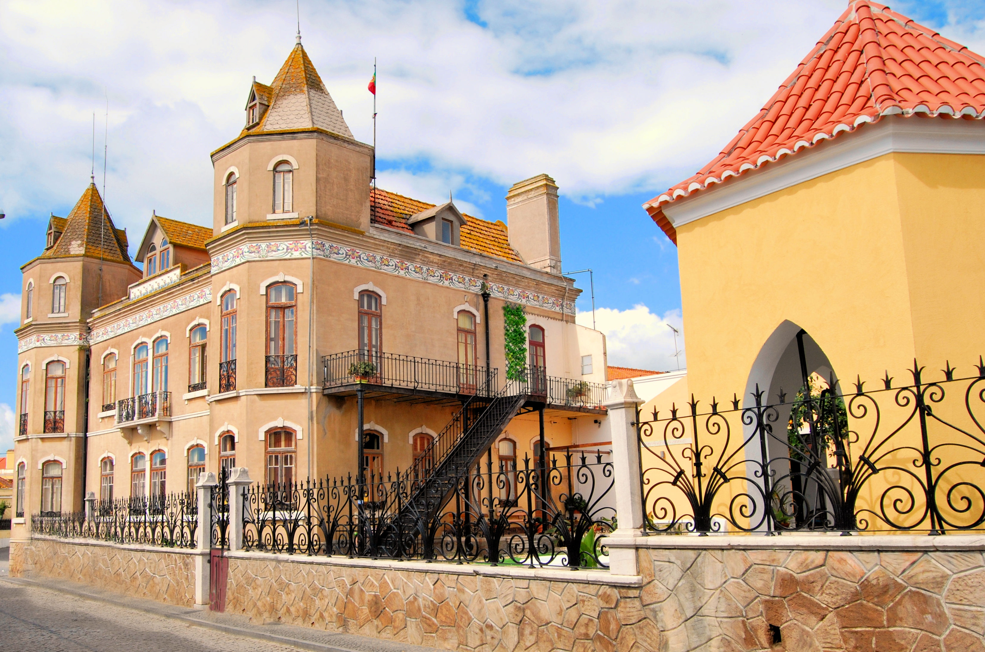 Fotografia realizada após a requalificação realizada em 2014 e 2015.